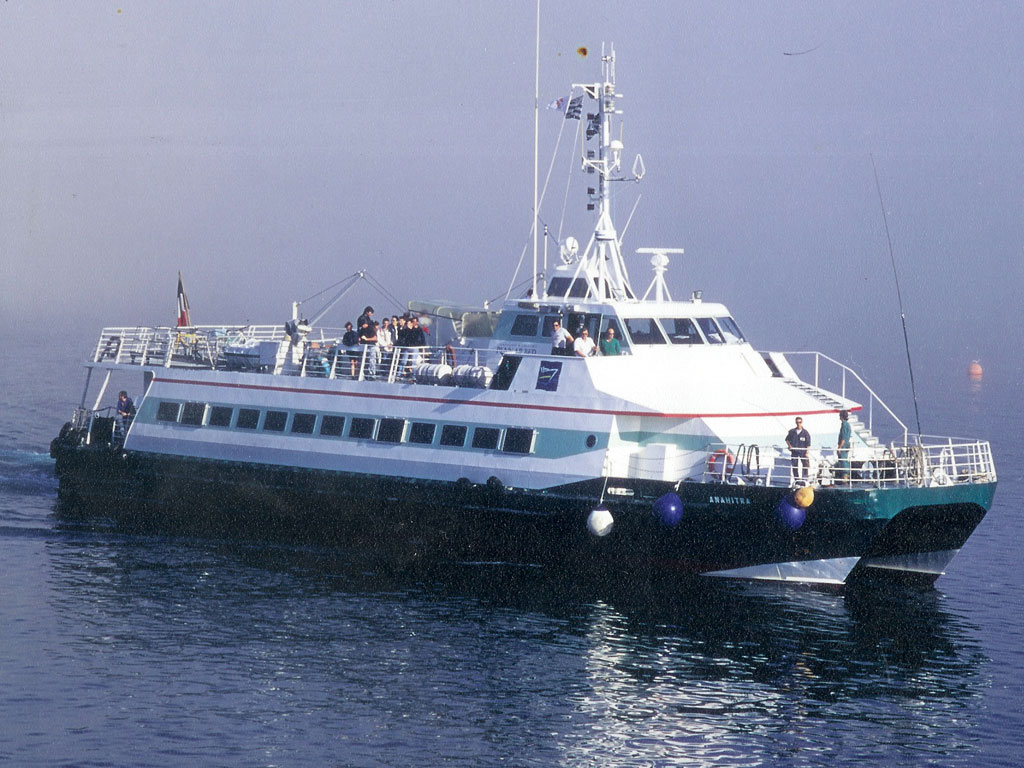 L'Anahitra, catamarn rapide affrété par la compagnie maritime Penn ar bed dans les années 90.